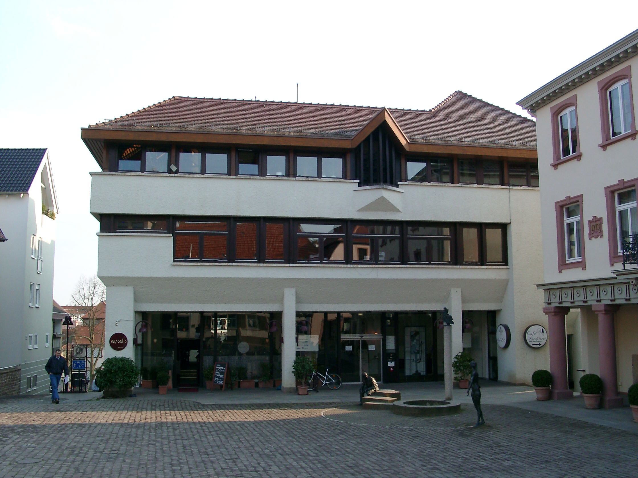 Wiesloch, Neues Rathaus